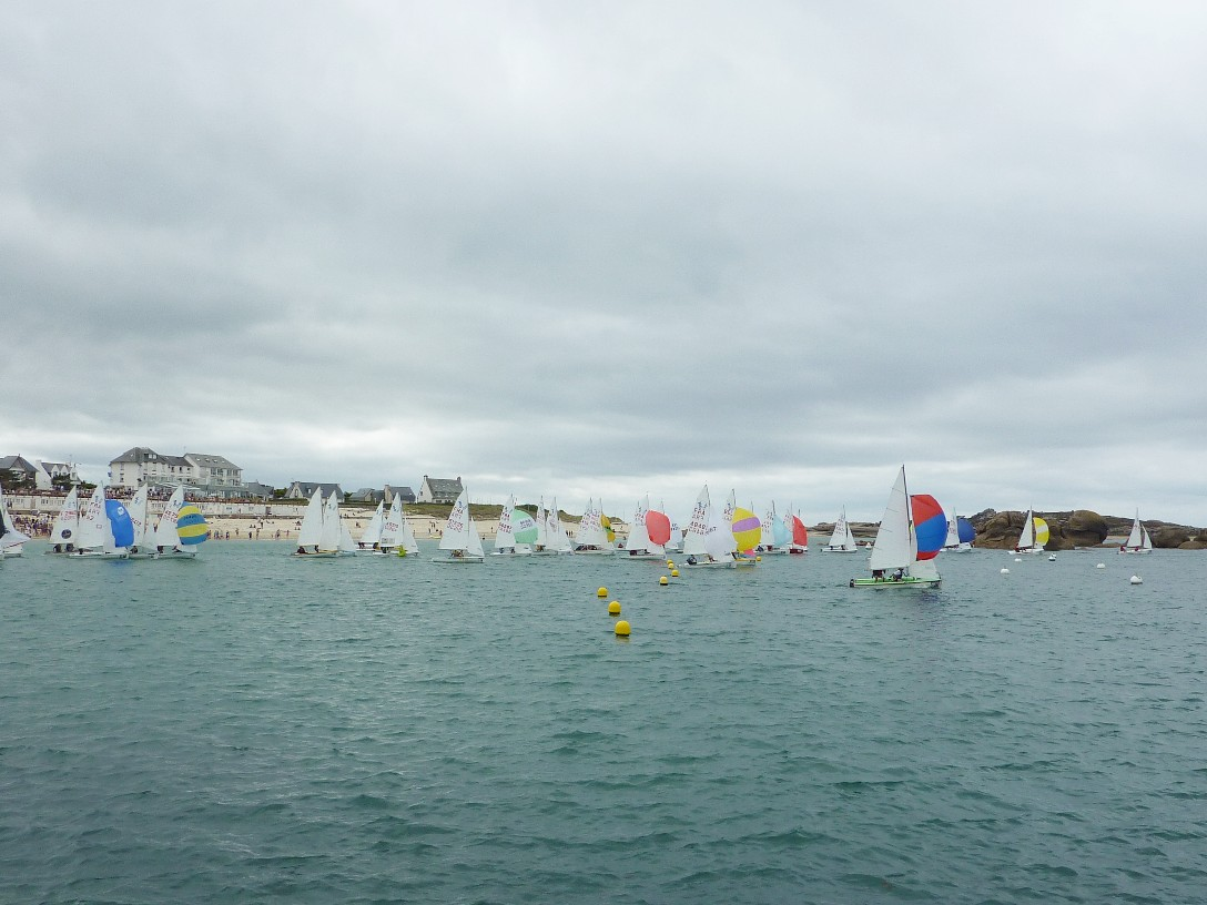 24h voile 2010; 5 minutes après le départ